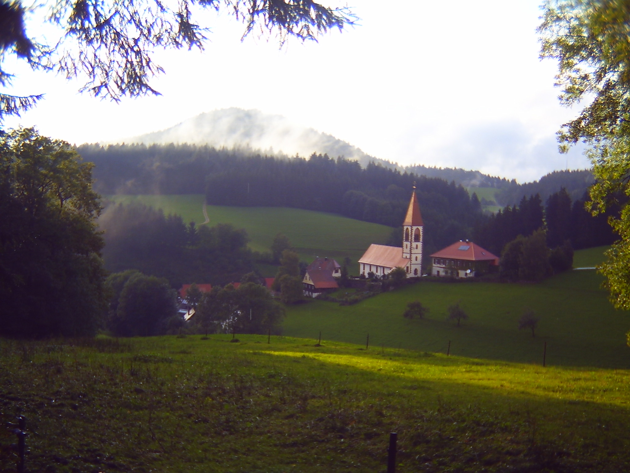 Wolfach Bergdorf Sankt Roman